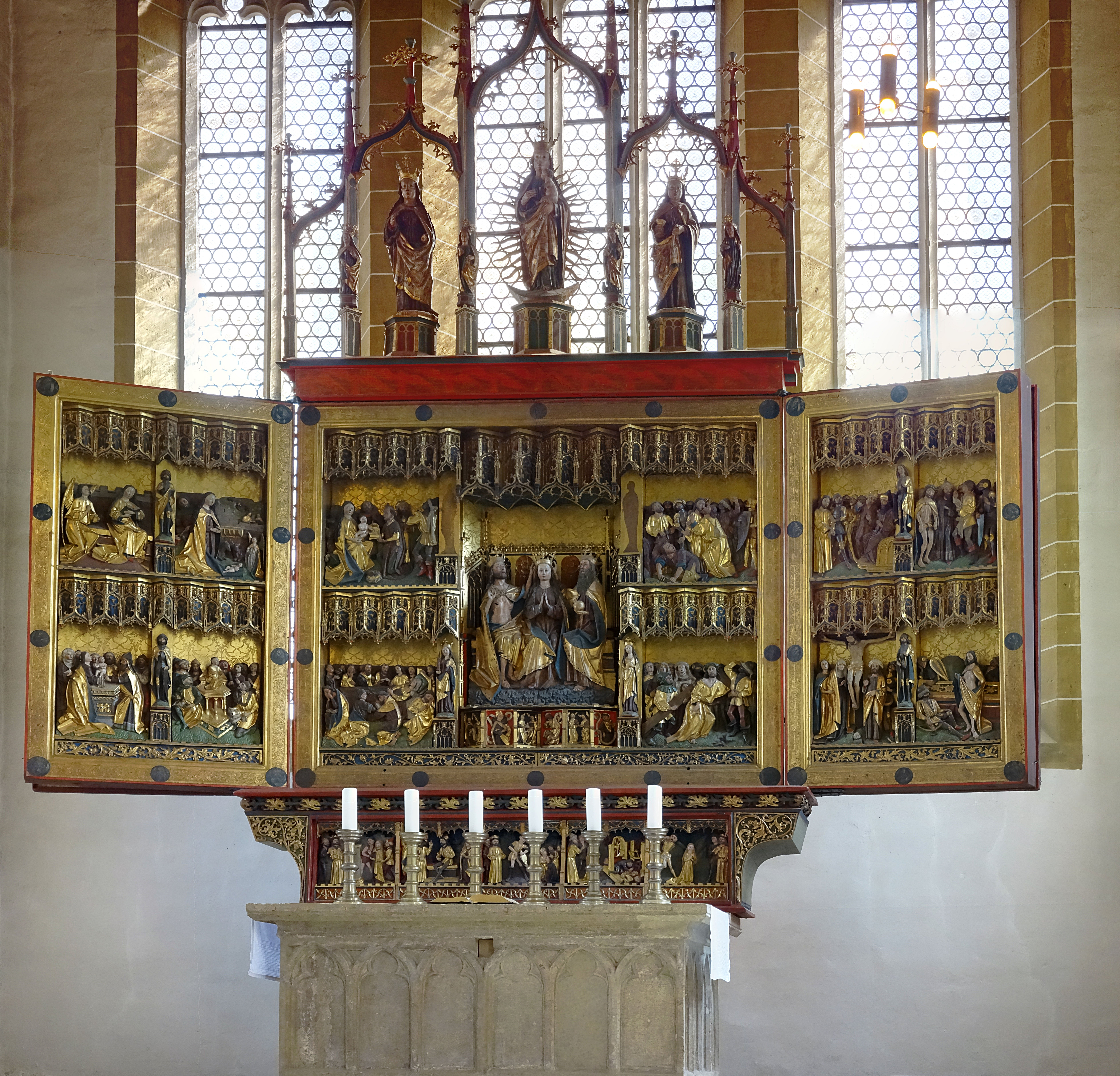 Der spätgotische Flügelaltar der Reglerkirche in Erfurt (um 1465)